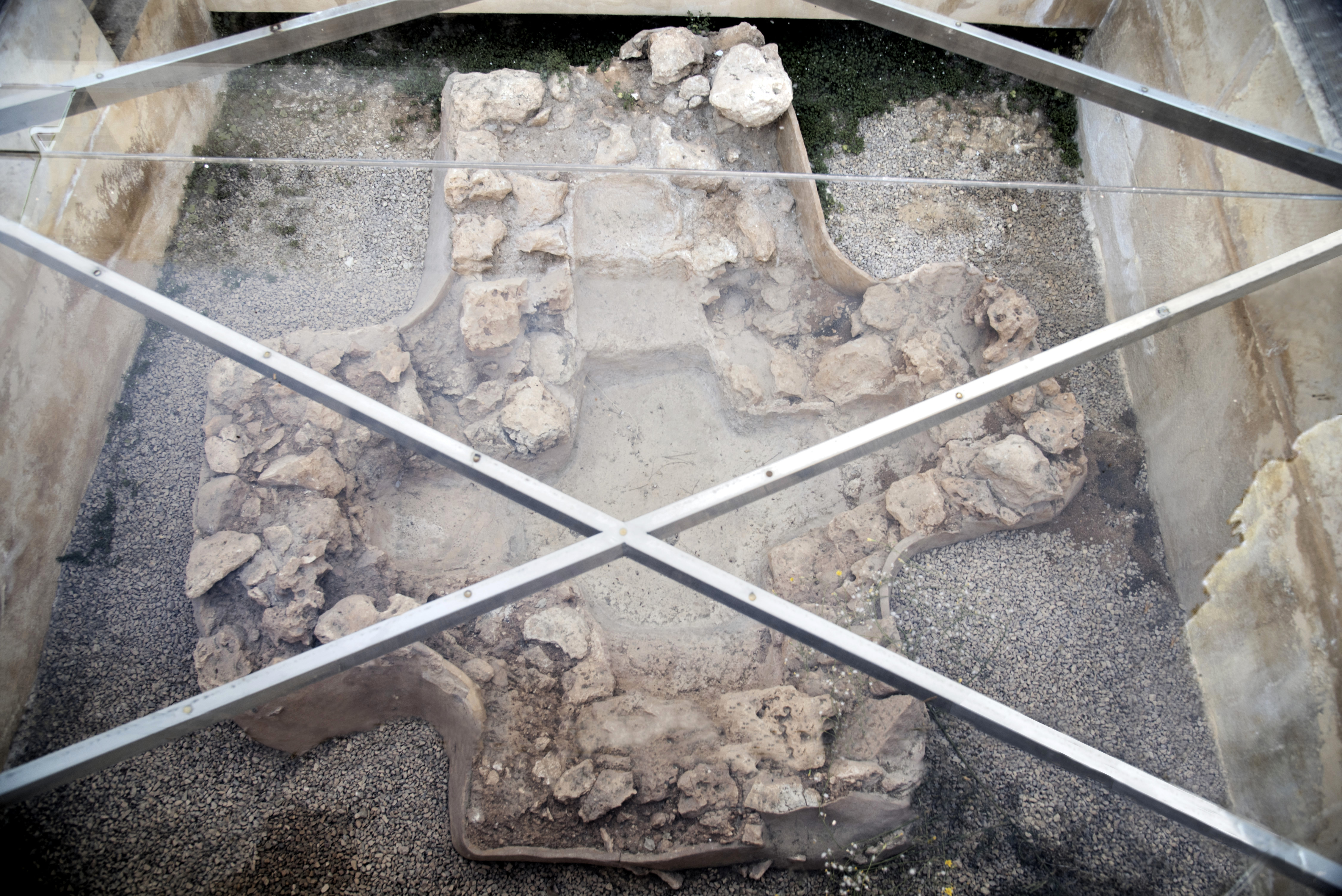 Baptisteri sa Carrotja darrera el vidre protector